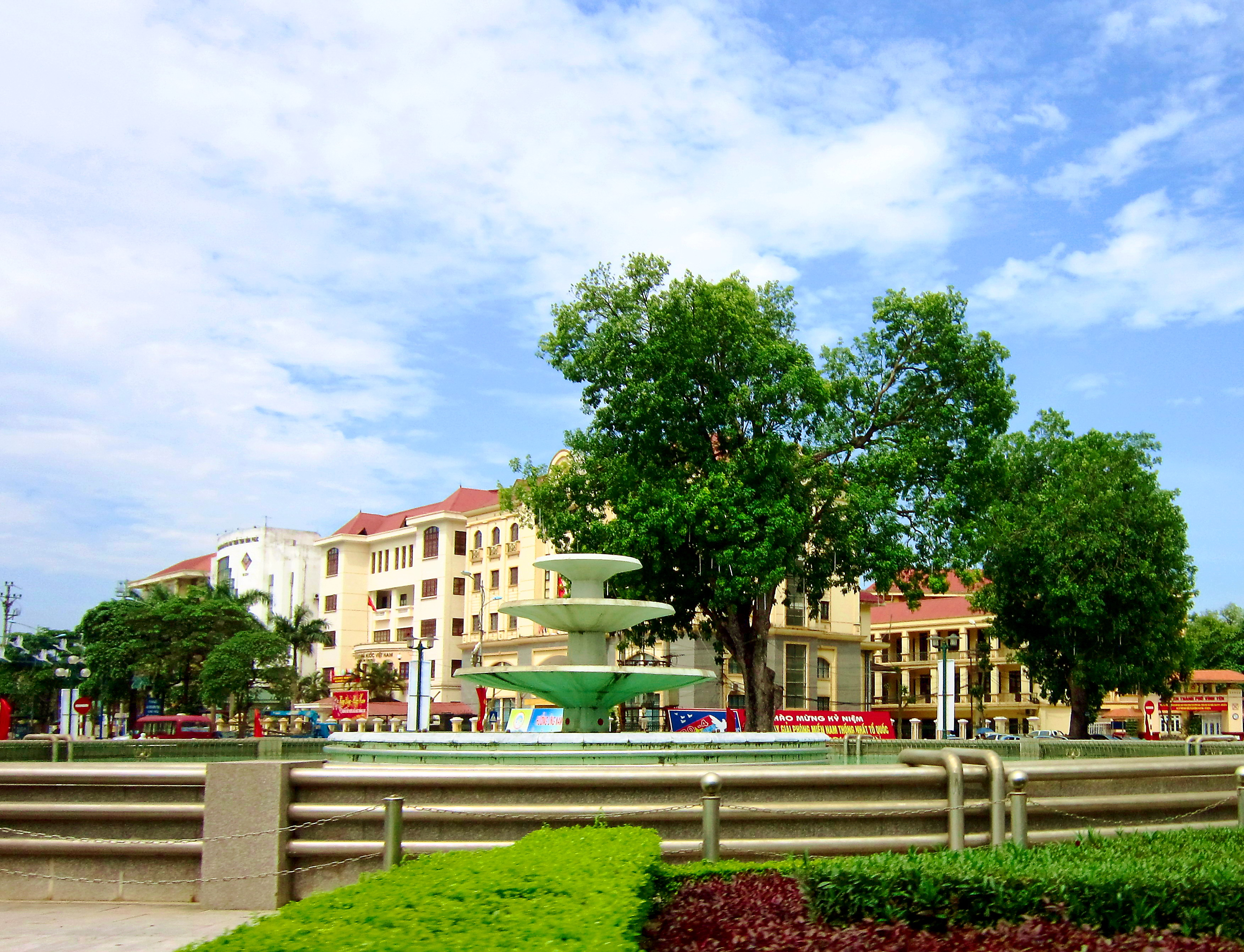 Vòng xoay ở chỗ Bưu điện tỉnh Vĩnh Phúc, TP. Vĩnh Yên, tỉnh Vĩnh Phúc, Việt Nam.